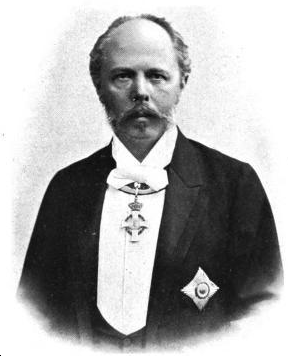 Ernst von Schuch